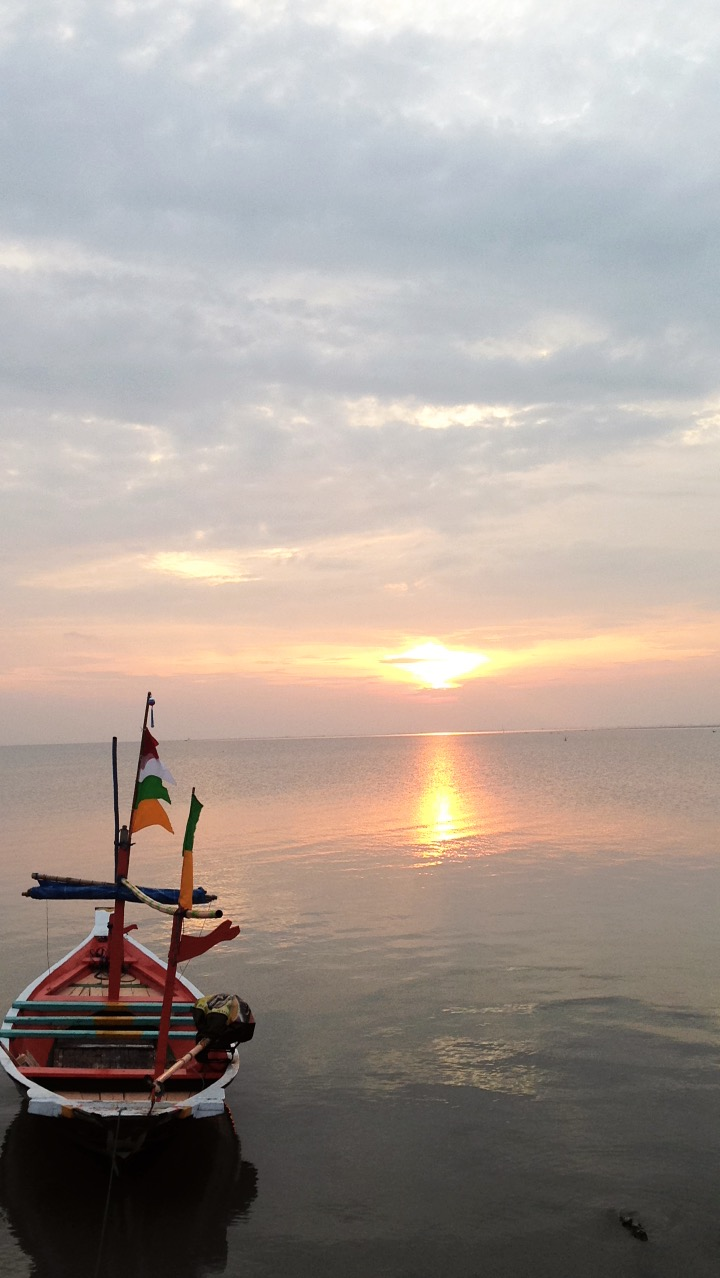 Pantai Kenjeran Terletak di Kota Surabaya, Indonesia. selain terdapat pantai dengan panorama yang Indah. Terdapat juga beberapa Bangunan Unik dan Patung Raksasa seperti Kya-Kya Seaside, Dewi Kuan In, dan Pagoda Tian Ki.